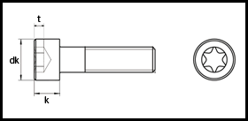 ISO 14579